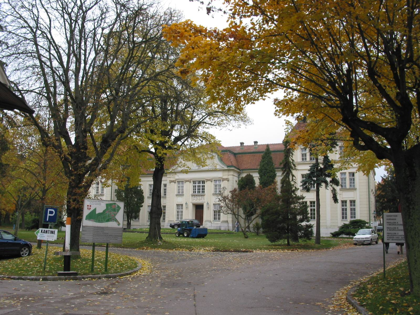 Neurologisches Hospital Rosenhügel en: Neurological hospial Rosenhügel